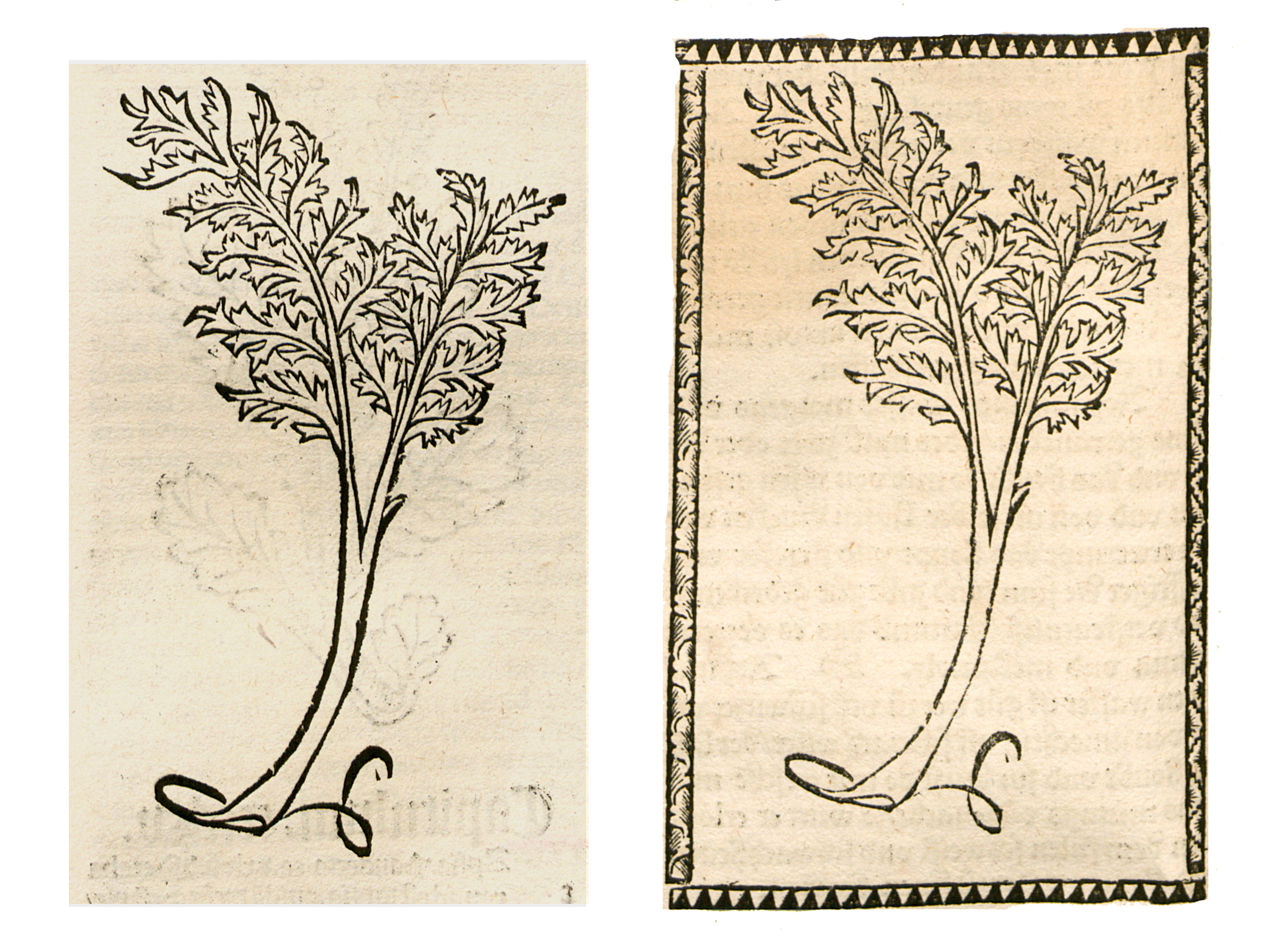 Abbildung von: Reyn Farn (Tanacetum vulgare)